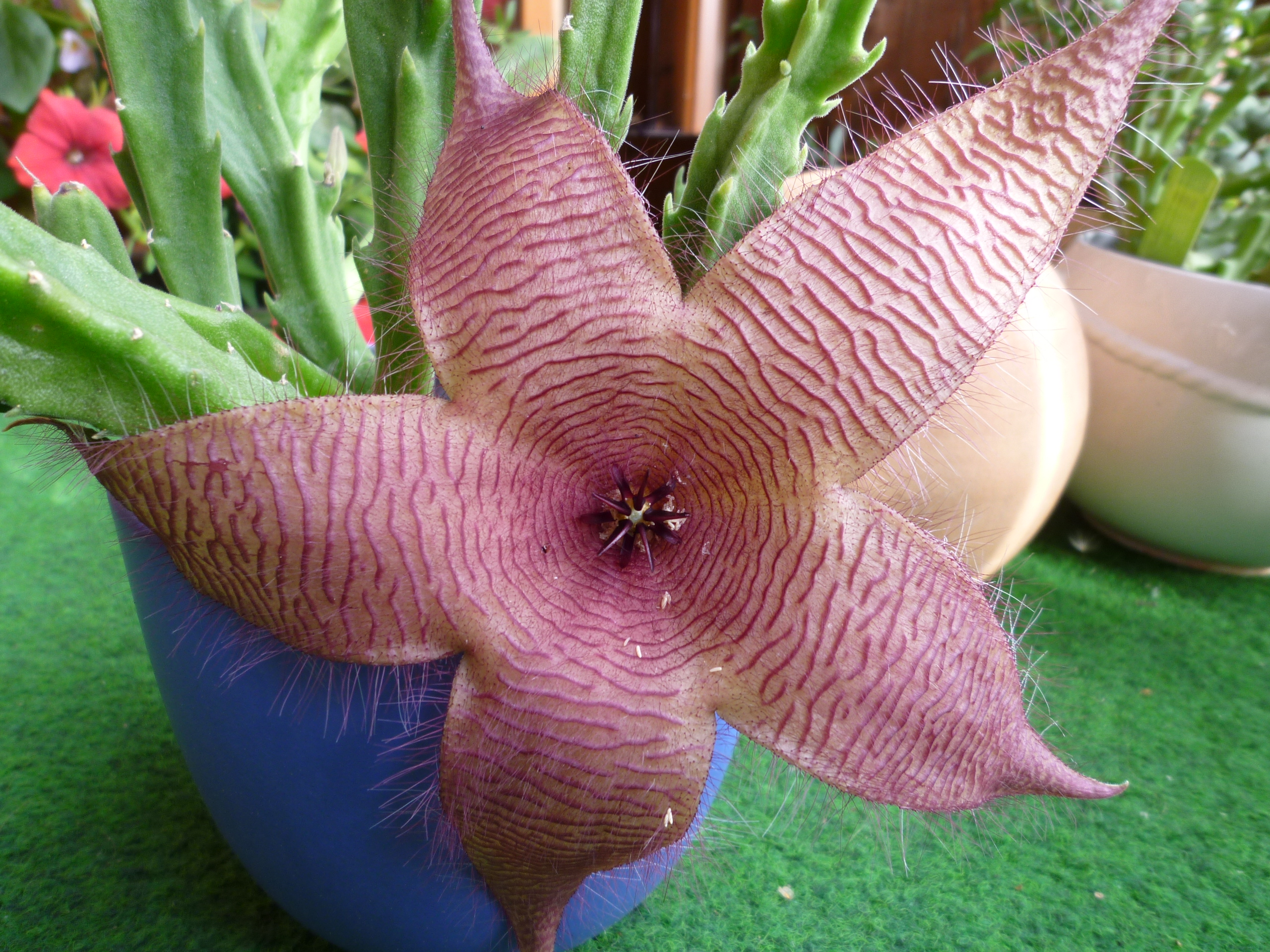 Blüte der Stapelia grandiflora (Aasblume). Durch ihren aasähnlichen oder kotartigen Gestank der Blüte lockt diese Pflanze Schmeißfliegen zur Bestäubung an. Die Blüte ist fünfteilig und fein behaart. Auf dieser Blüte ist bereits eine Eiablage einer Schmeißfliege erfolgt.